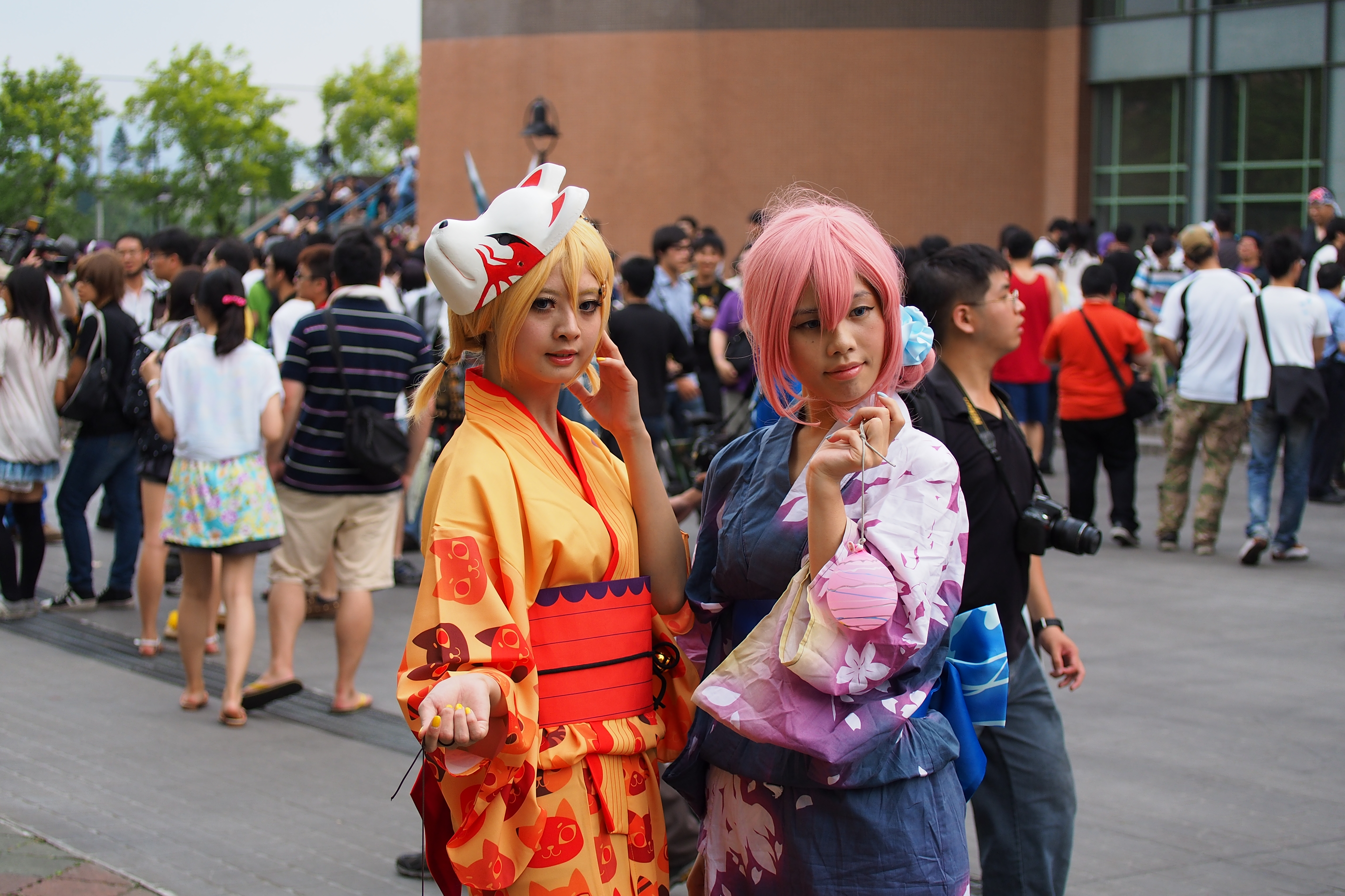 第22屆開拓動漫祭，《出包王女Darkness》金色闇影（左）、茉茉·貝莉雅·戴比路克（右）cosplayer。